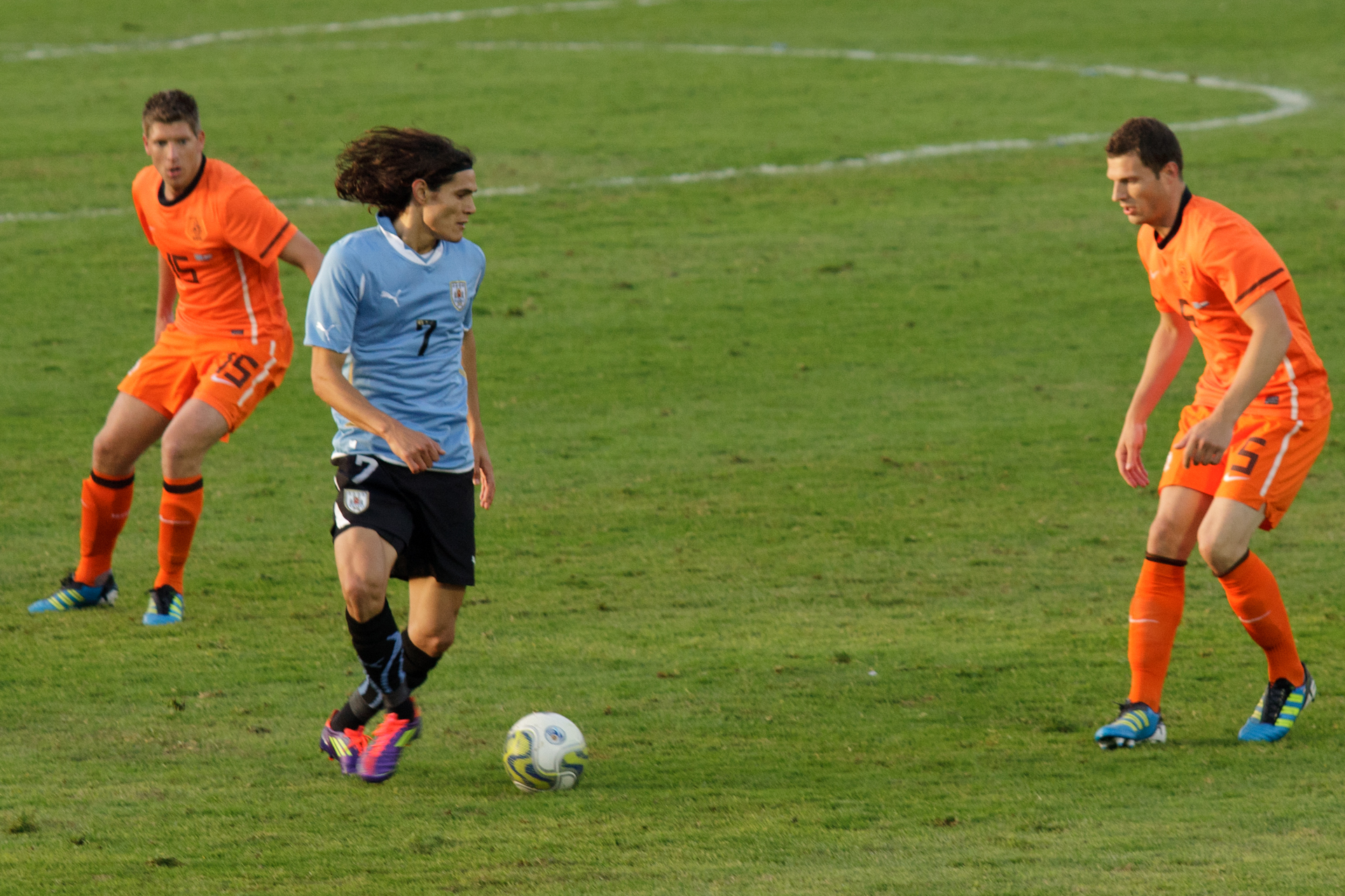 Stijn Schaars & Edinson Cavani